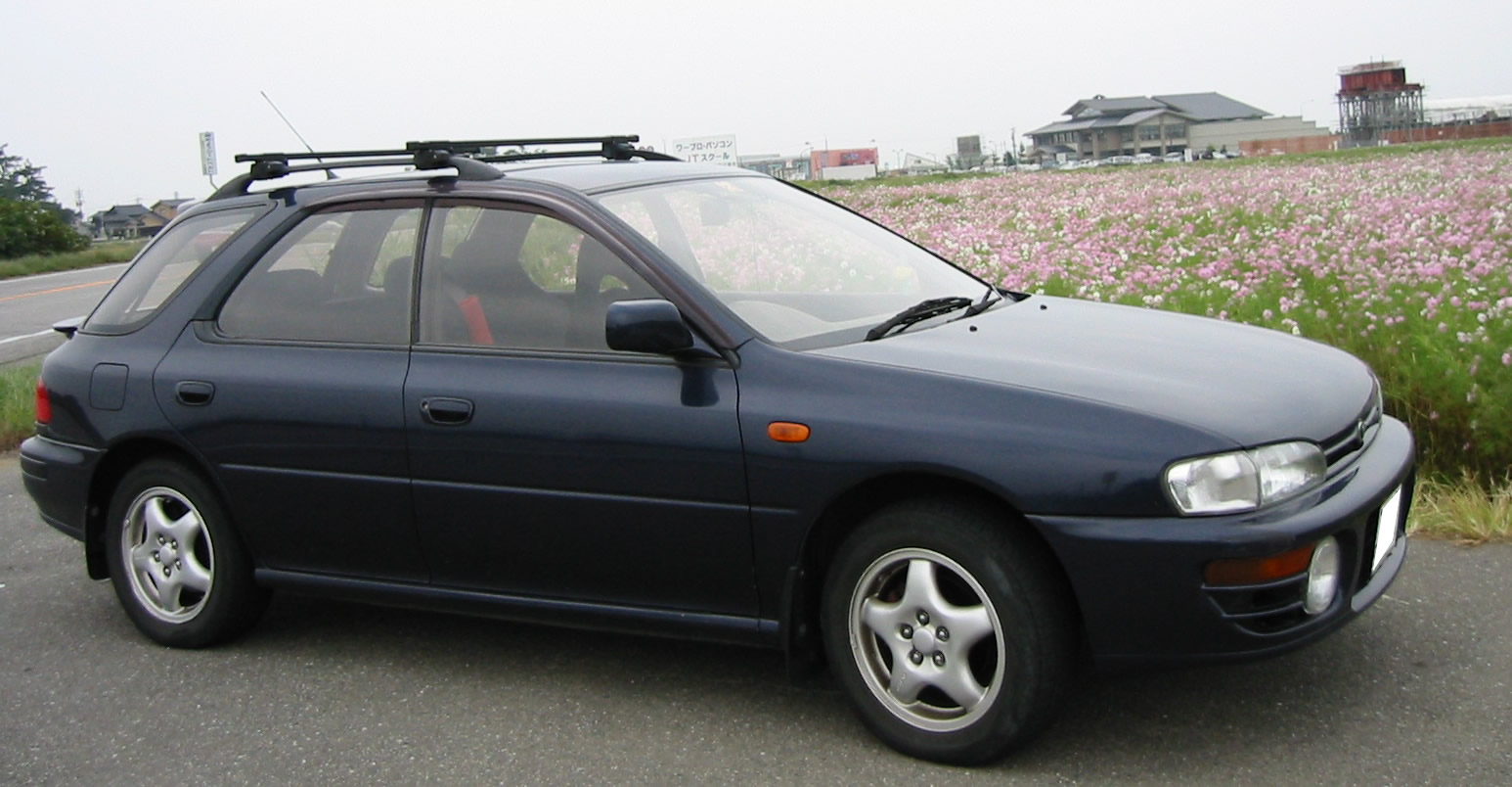 SUBARU IMPREZA SPORTSWAGON (スバル・インプレッサ)